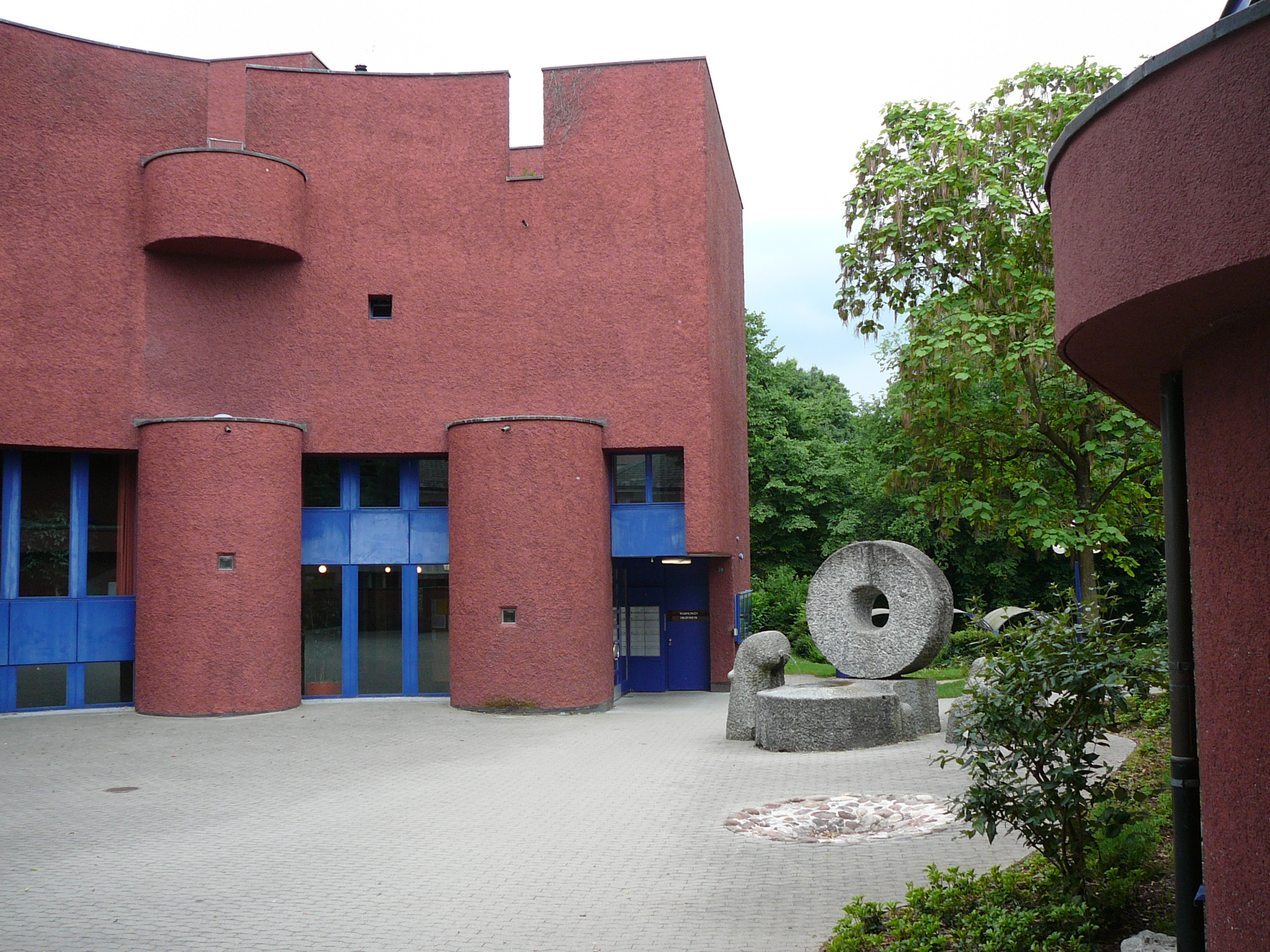 Römisch-katholische Pfarrkirche St. Anna, Opfikon-Glattbrugg, Innenhof